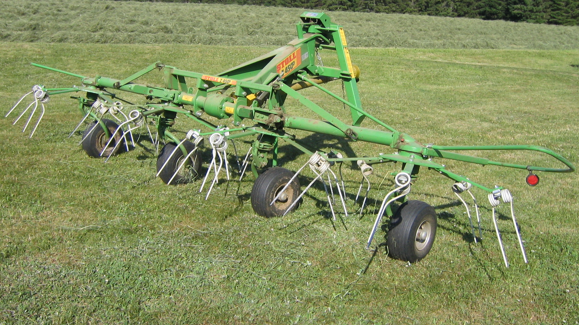 Heuwender Stoll Z450